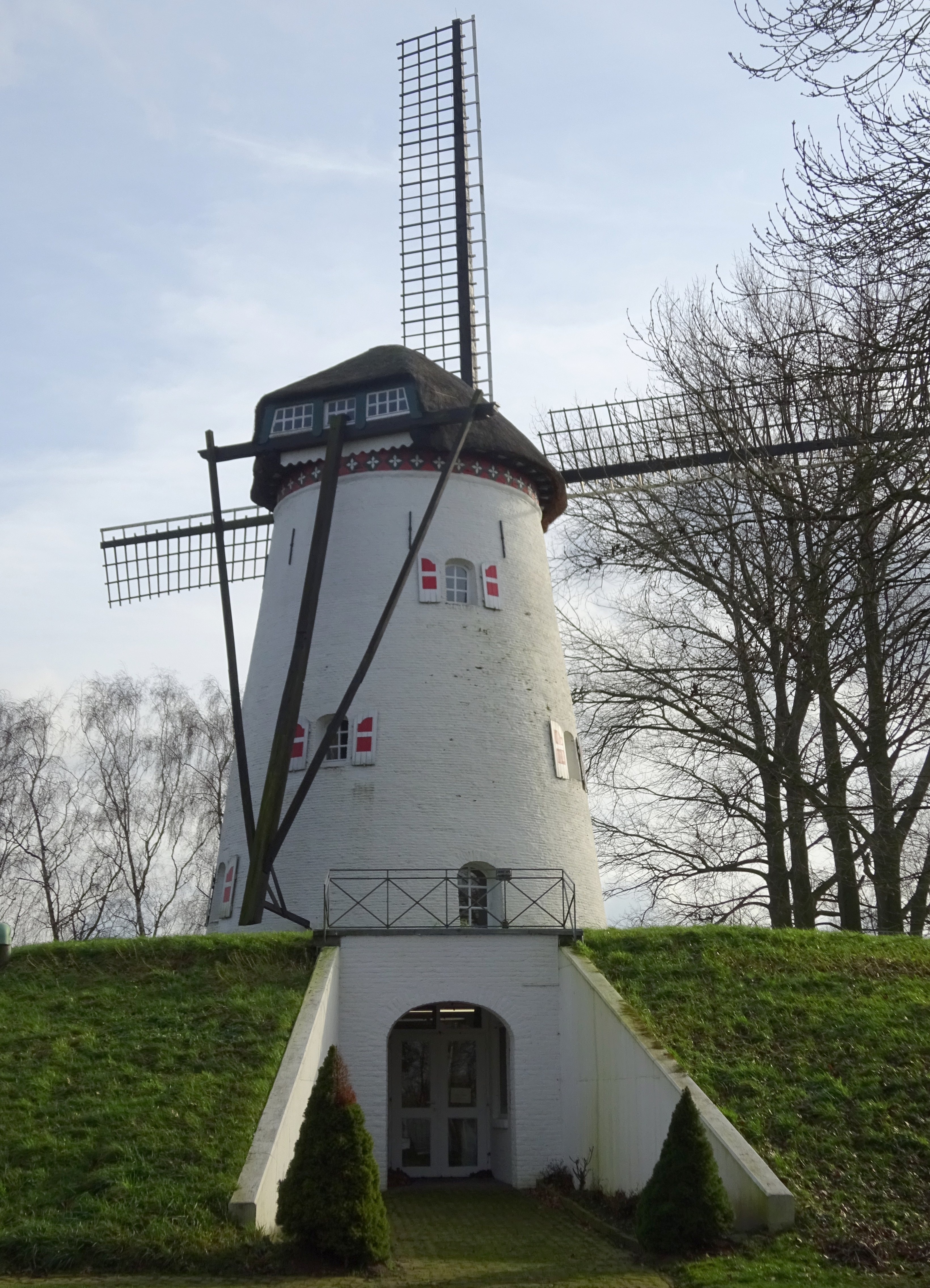 Kleve-Keeken, Hofacker 43. Mühle Keeken